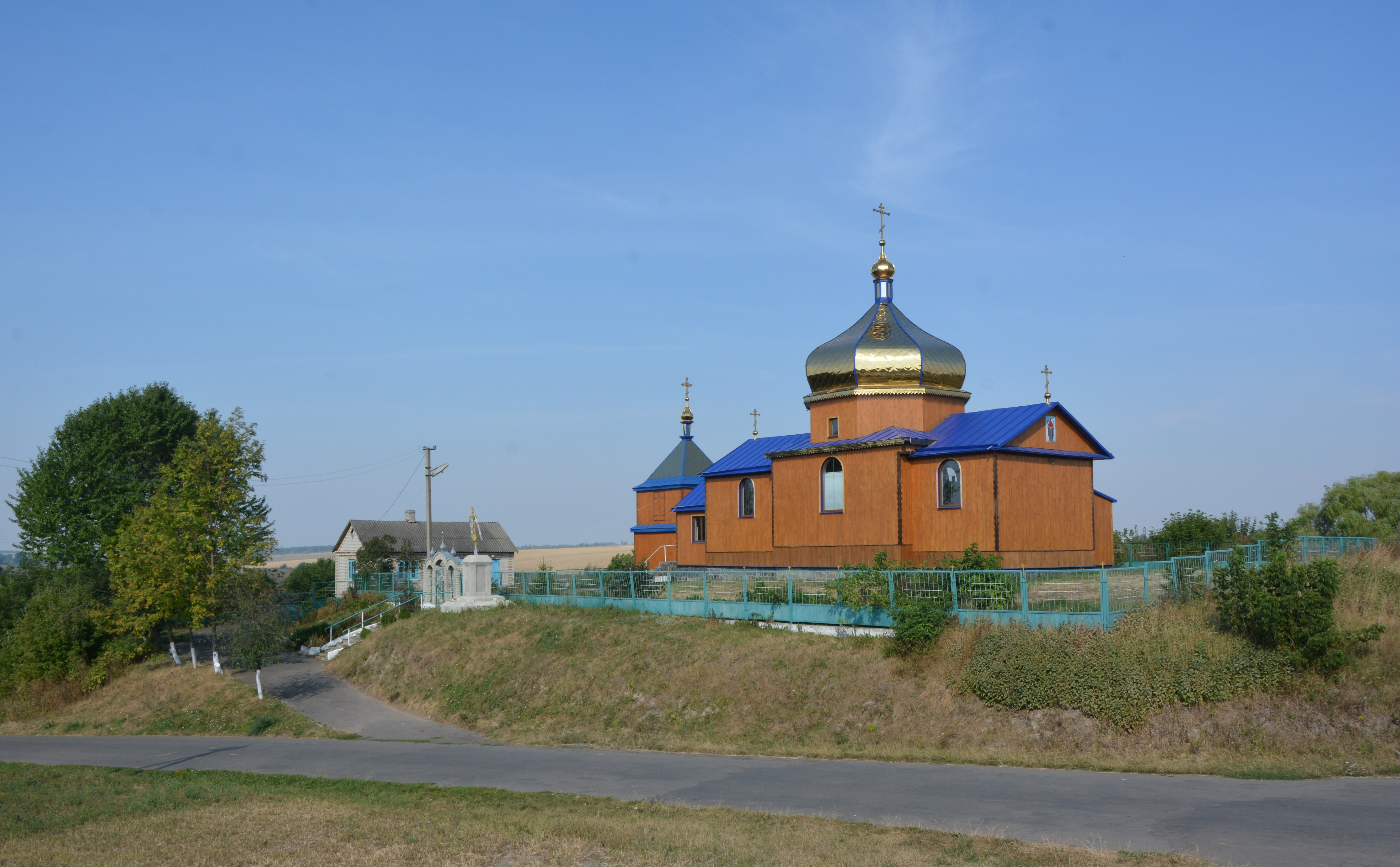 Ансамбль Борисоглібської церкви, Шклинь